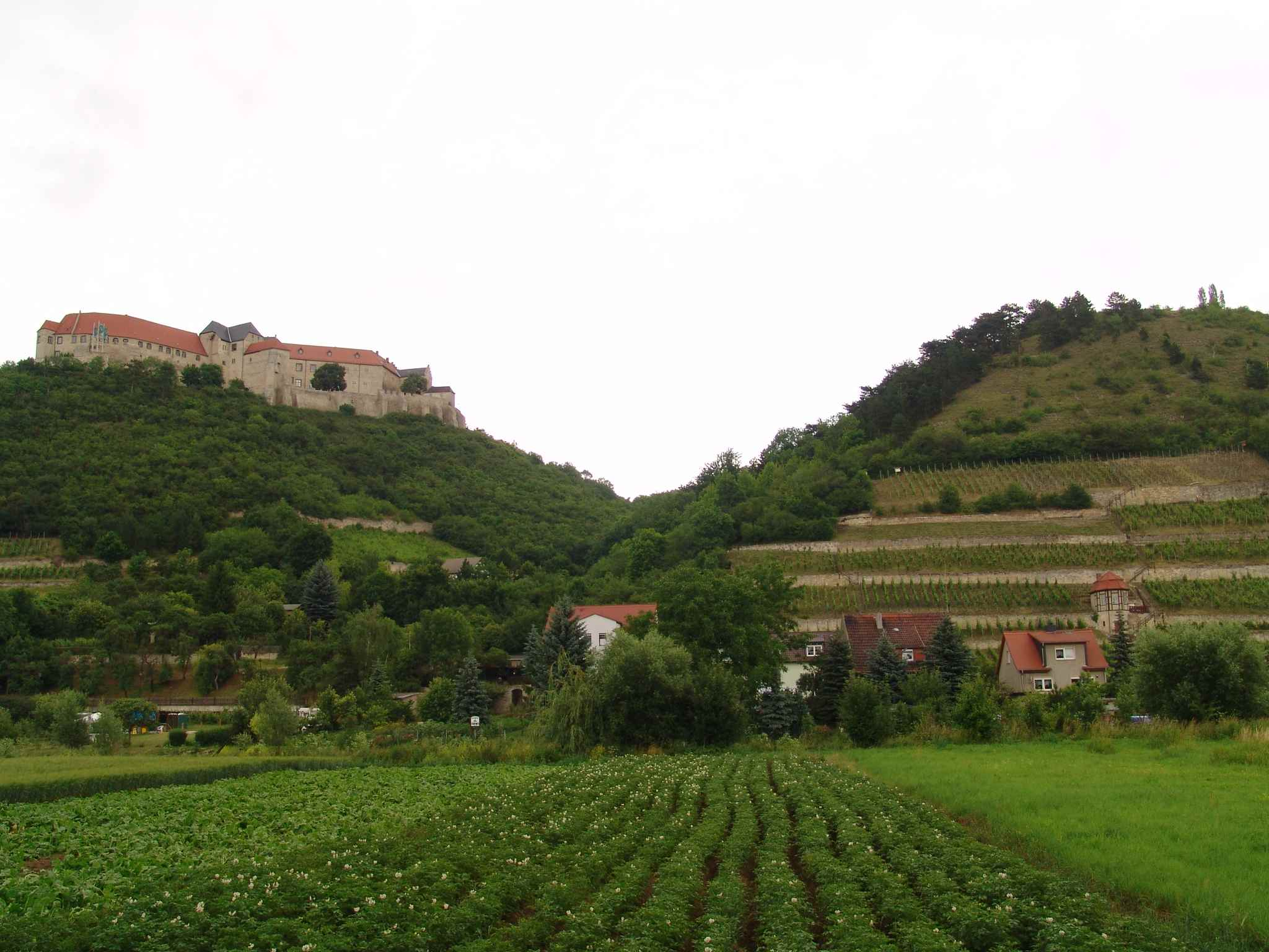 Beschreibung: Die Neuenburg in Freyburg/Unstrut (2005). Quelle: selbst fotografiert Lizenz